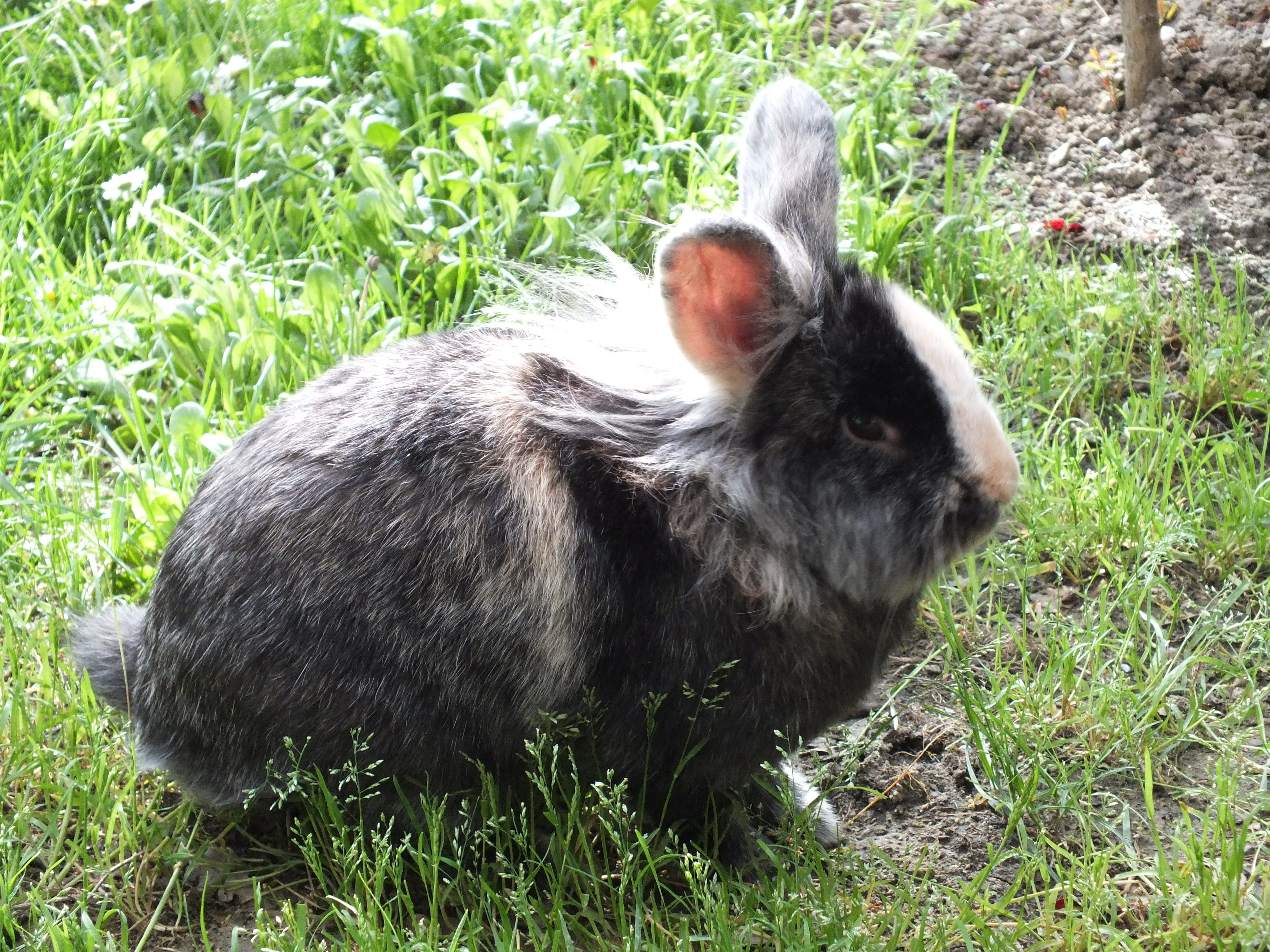 Chicco, esemplare di testa di leone